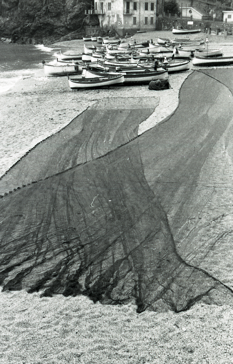 Serie fotografica : Monterosso al Mare, 1957 / Paolo Monti. - Strisce: 7, Fotogrammi complessivi: 40 : Negativo b/n, gelatina bromuro d'argento/ pellicola ; 35 mm. - ((I fotogrammi hanno una doppia numerazione. . - Sul portanegativi: Leica 3F HP3. - Sul dorso del portanegativi Monti specifica: "Paesaggi, particolari, ecc. Con Carlo che dipinge. Reti"